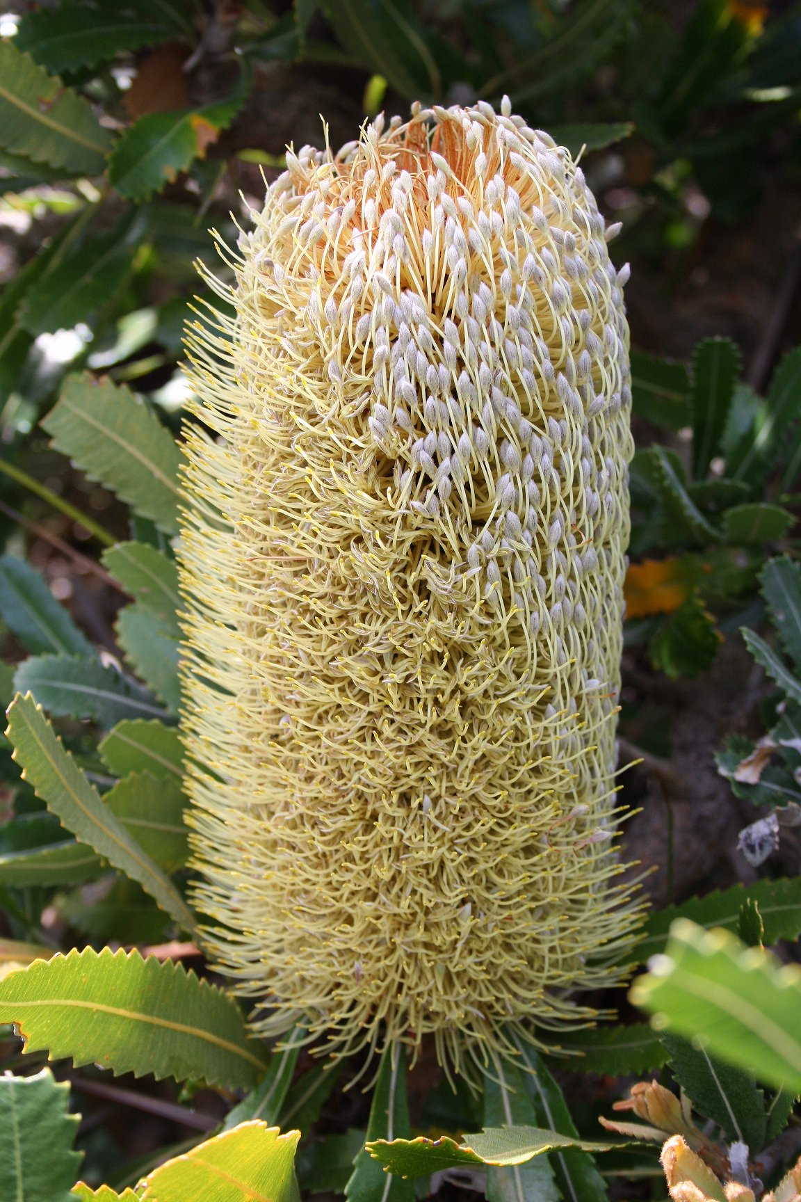 Banksia serrata, Henry Head